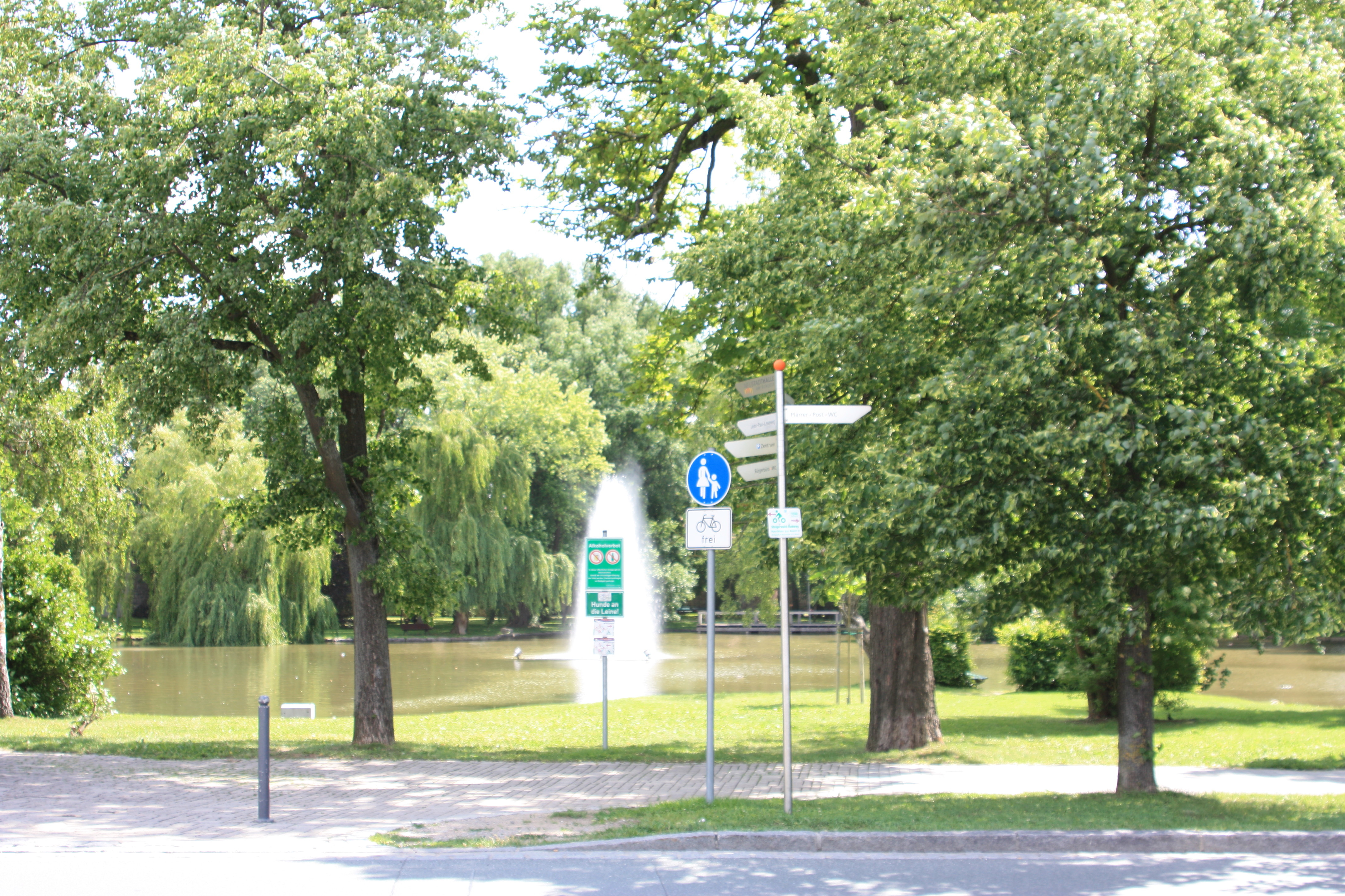 Staatsstraße 2255 Neustadt a. d. Aisch